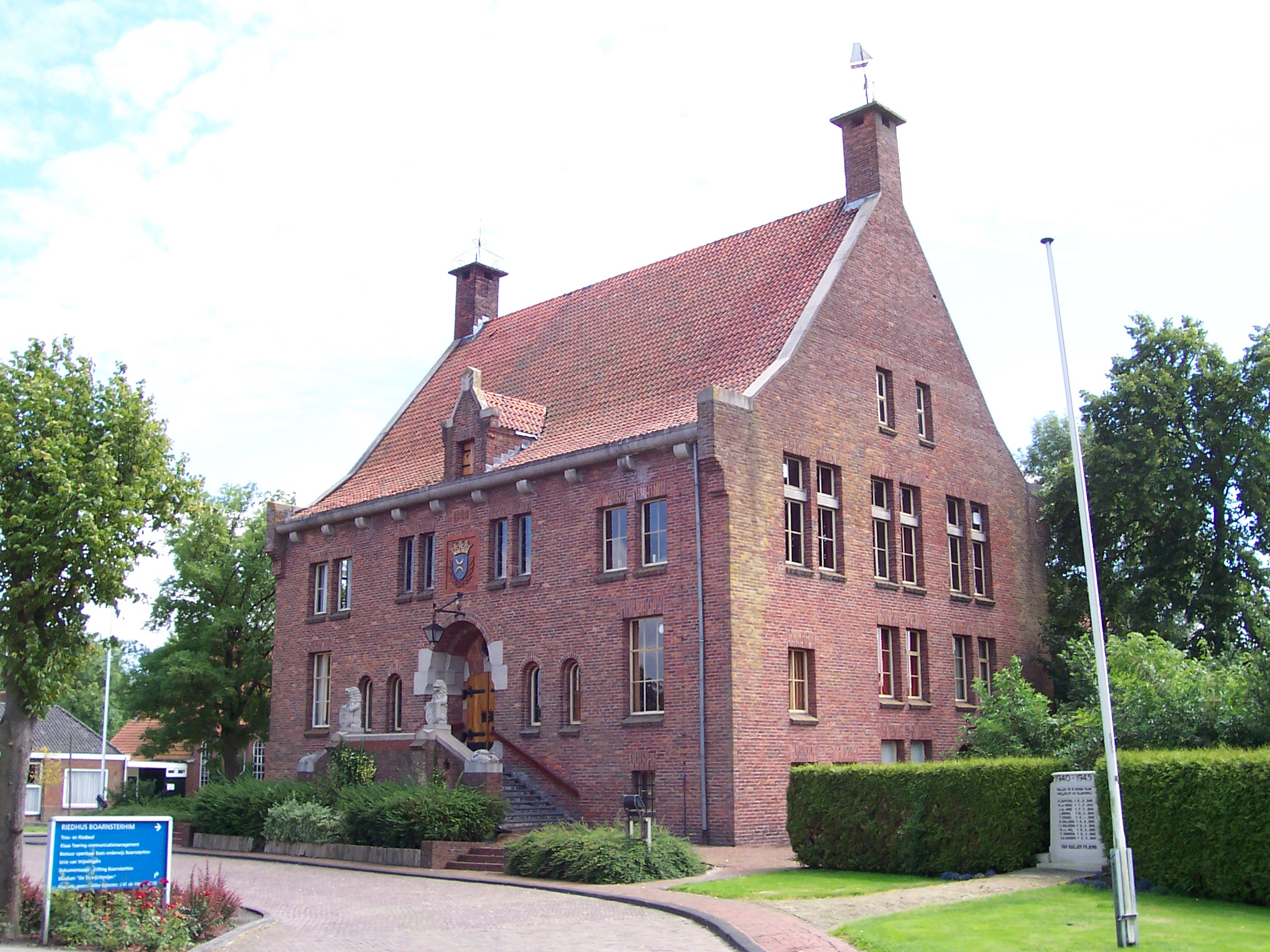 Grou, Rathaus der Gemeinde BoarnsterhimFrysk: Grou, Riedhûs fan de gemeente Boarnsterhim